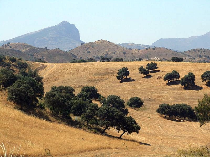 Dehesa en las Sierras Olvereñas (Andalucía, España).